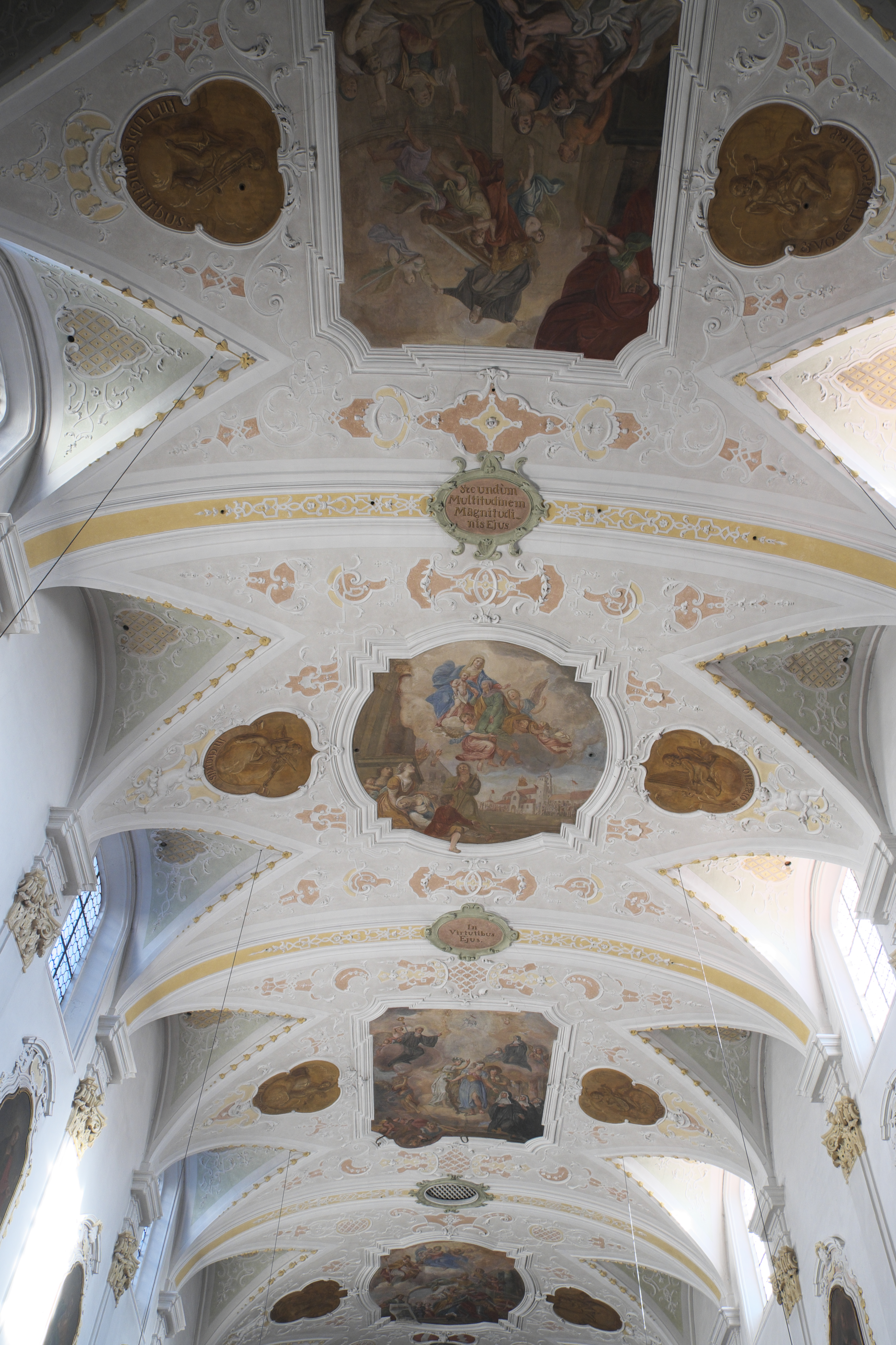 Katholische Pfarrkirche St. Emmeram, ehemalige Benediktinerinnen-Klosterkirche Mariä Himmelfahrt, in Geisenfeld im Landkreis Pfaffenhofen an der Ilm (Bayern/Deutschland), Deckenfresken und Stuckdekor im Langhaus von Melchior Buchner (Puchner, Büchner), von 1728